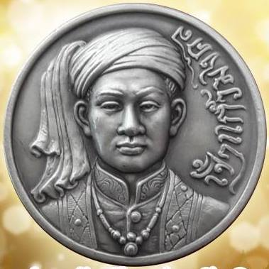 ทรงเป็นเจ้าผู้ครองเมืองทุ่งศรีภูมิพระองค์แรกจากราชวงศ์ล้านช้าง (หลังการย้ายราชธานีจากหลวงพระบางมาสู่นครหลวงเวียงจันทน์) ปัจจุบันคือ ตำบลทุ่งศรีเมือง อำเภอสุวรรณภูมิ จังหวัดร้อยเอ็ด ท่านทรงเป็นปฐมราชวงศ์เจ้าจารย์แก้วของภาคอีสานซึ่งเป็นราชวงศ์หนึ่งที่แยกมาจากราชวงศ์ล้านช้างในอดีต เนื่องจากทรงเป็นปฐมบรรพบุรุษของเจ้าผู้ปกครองหัวเมืองลาวในภาคอีสานมากกว่า ๒๐ หัวเมืองและภาคเหนืออีกหนึ่งหัวเมือง